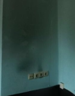 Fogging / Schwarzstaub über Steckdose